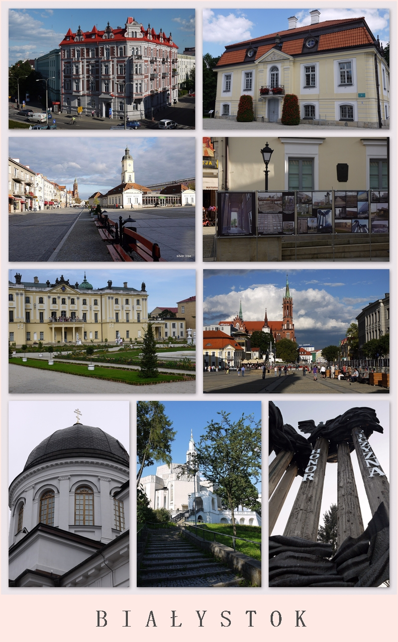 Église St Roch, Kamienica Krakowska 1, Hôtel de ville, Palais de Branicki, Place du Marché de T. Kościuszko (deux photos), Église orthodoxe de St Nicolas, monument aux Héros de la Région de Białystok, Dom Koniuszego